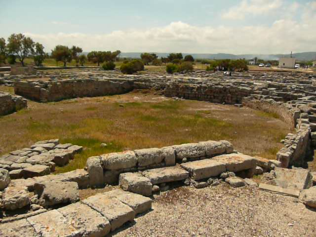 Parque arqueológico de Egnazia, Apulia.